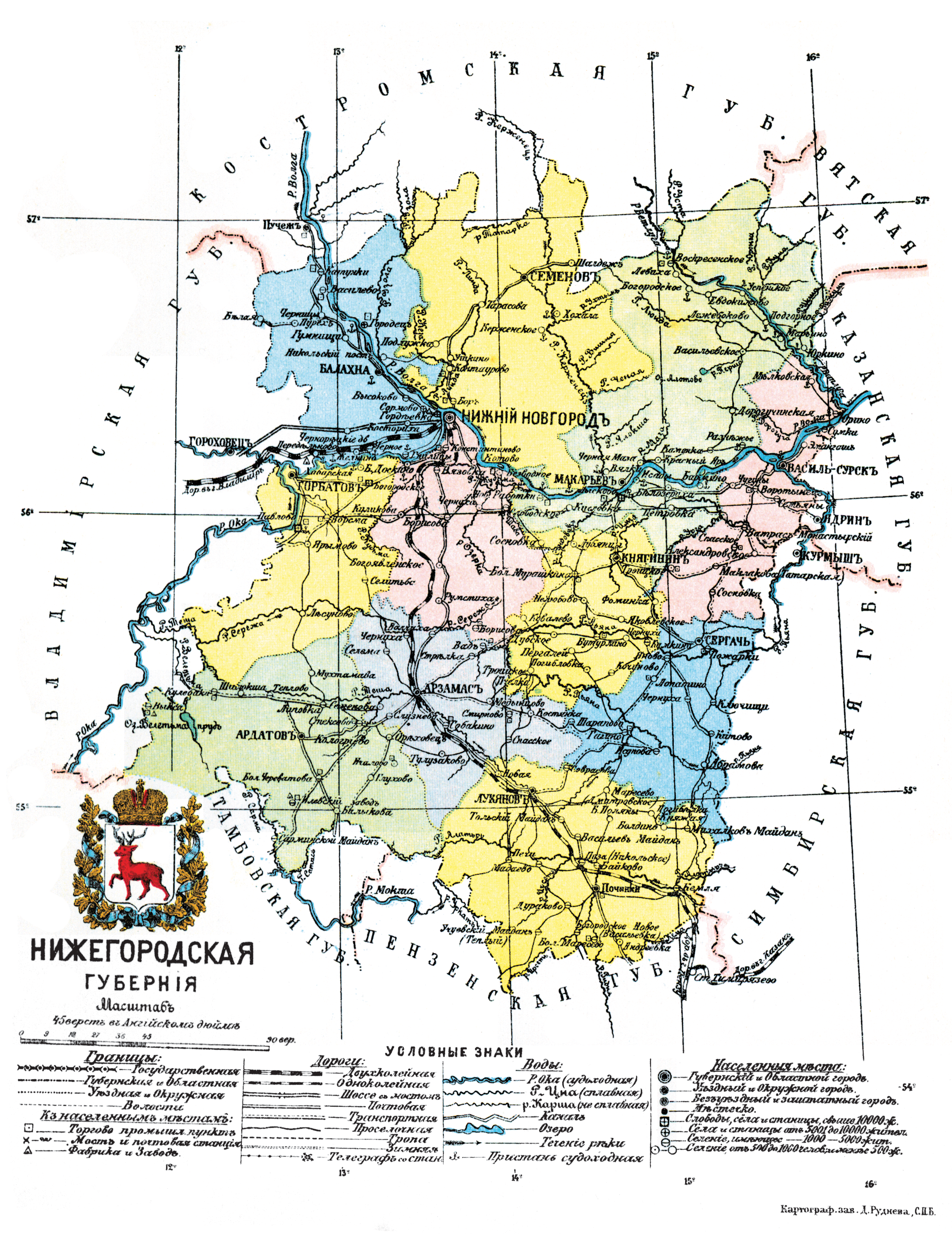 Карта Нижегородской губернии, 1913 год